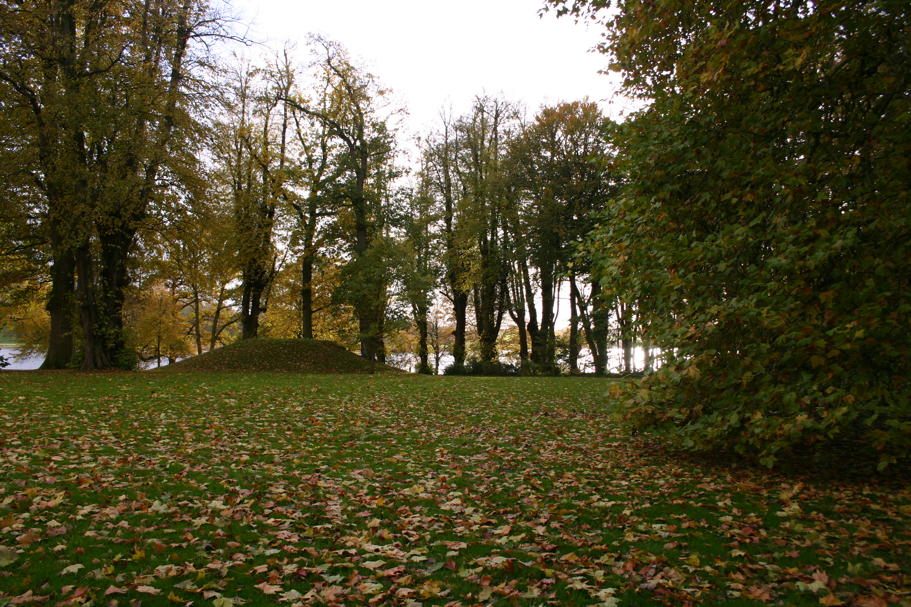 Denne høj blev brugt til opbevaring af is fra fjorden.